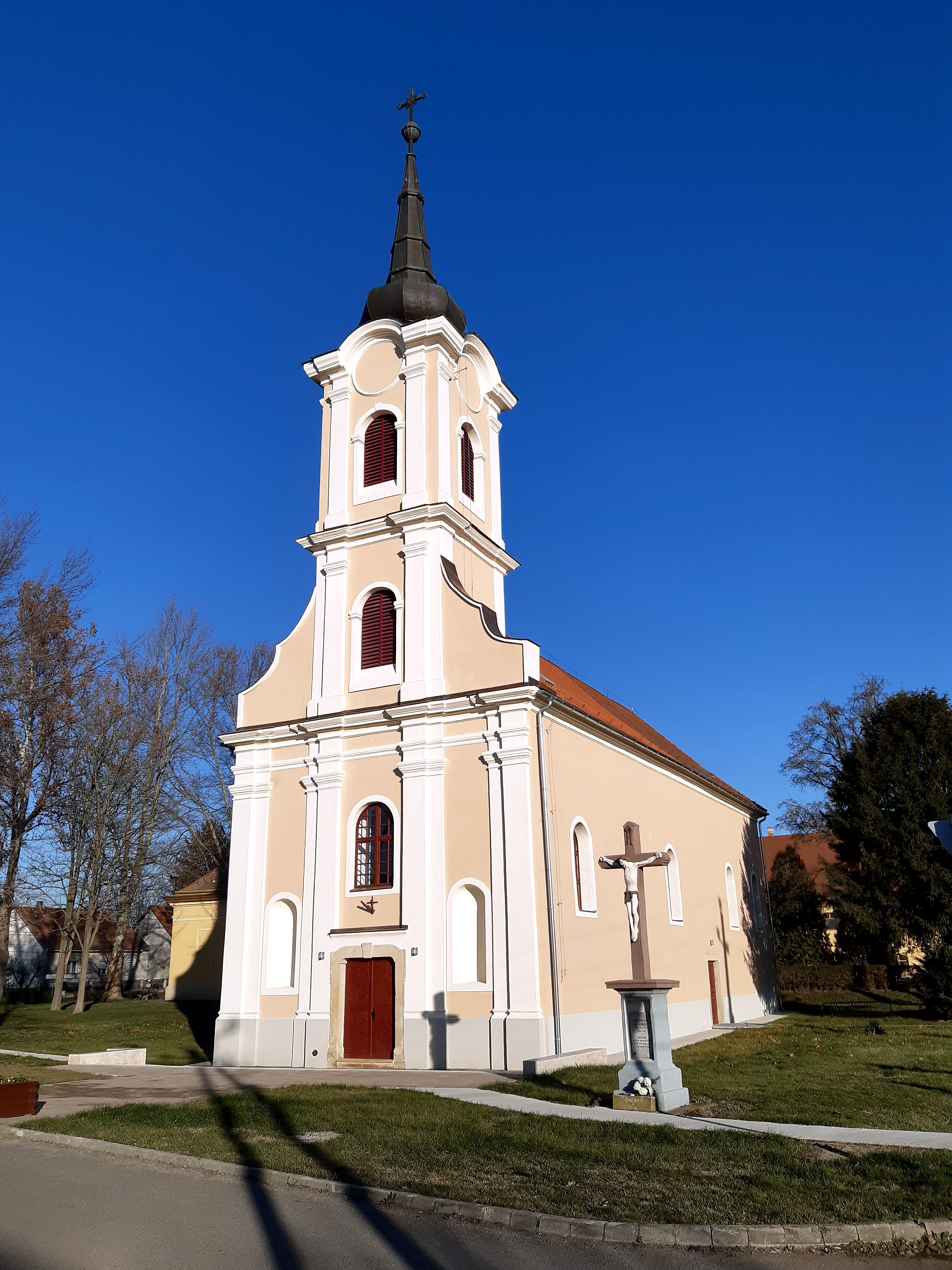 Szentlőrinci római katolikus templom